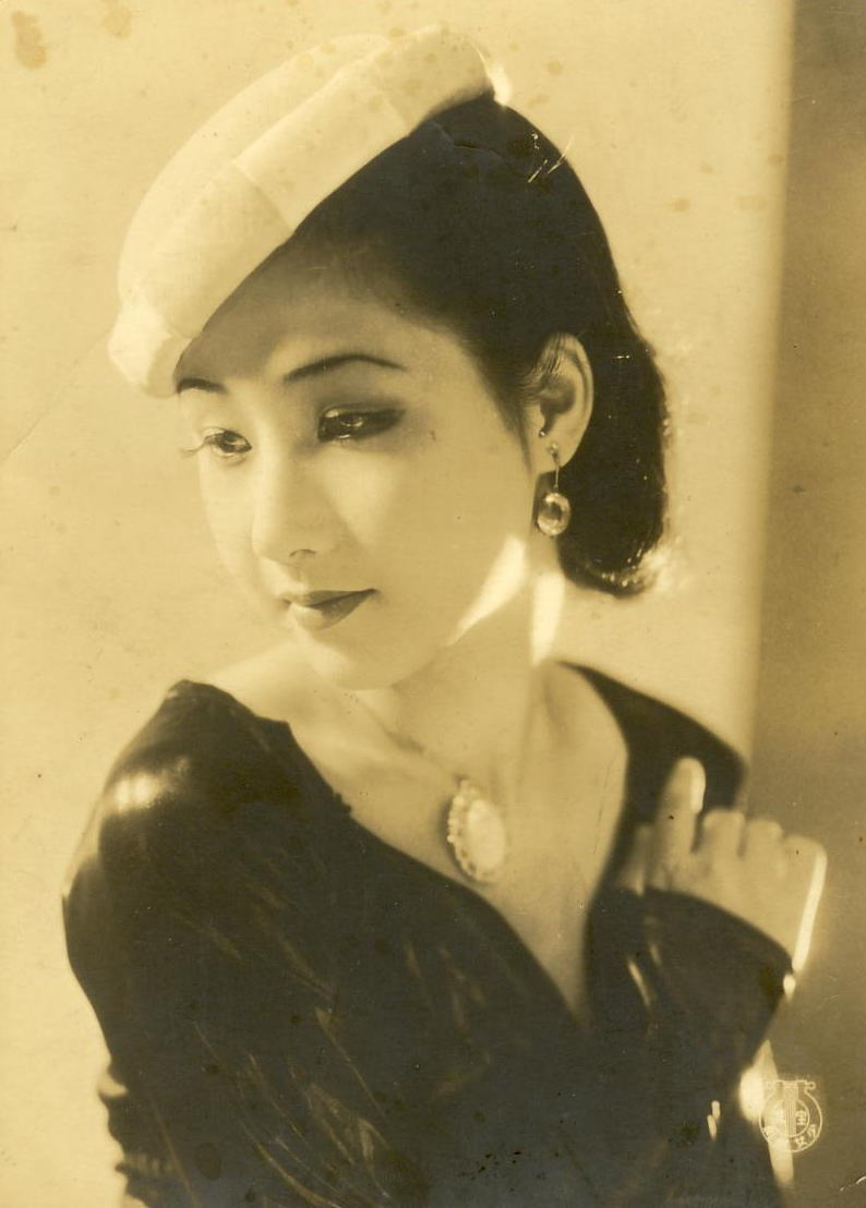 宝塚歌劇団２９期生 住江みちる